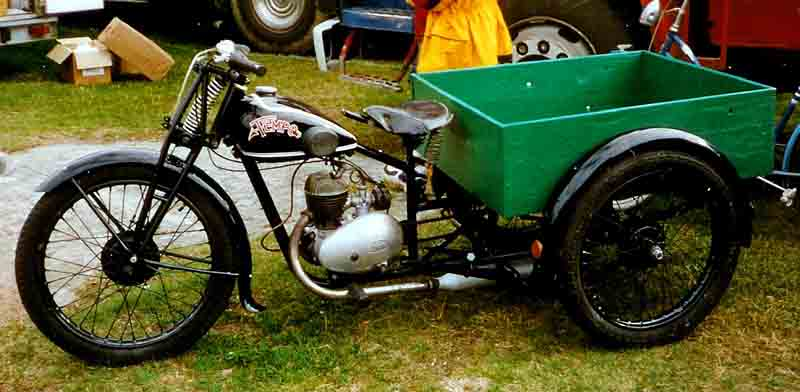 Tempo